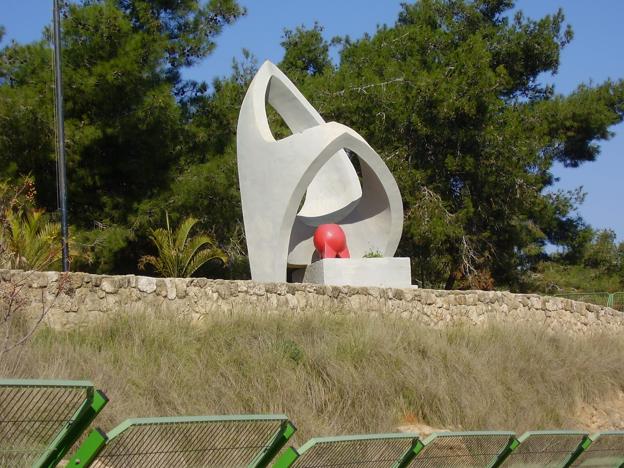 memorial to fallen soldiers, yavne, israel